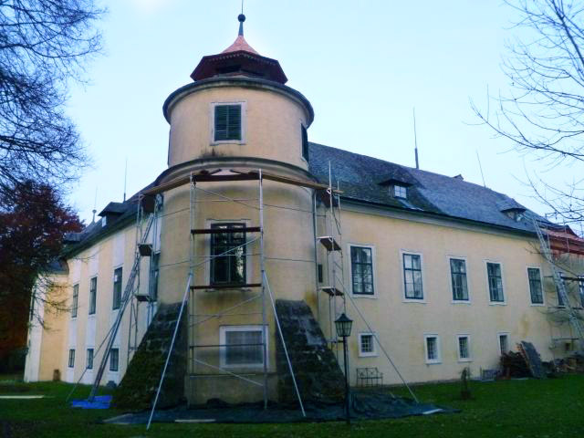 Schloss Wimsbach Renoivierungsarbeiten